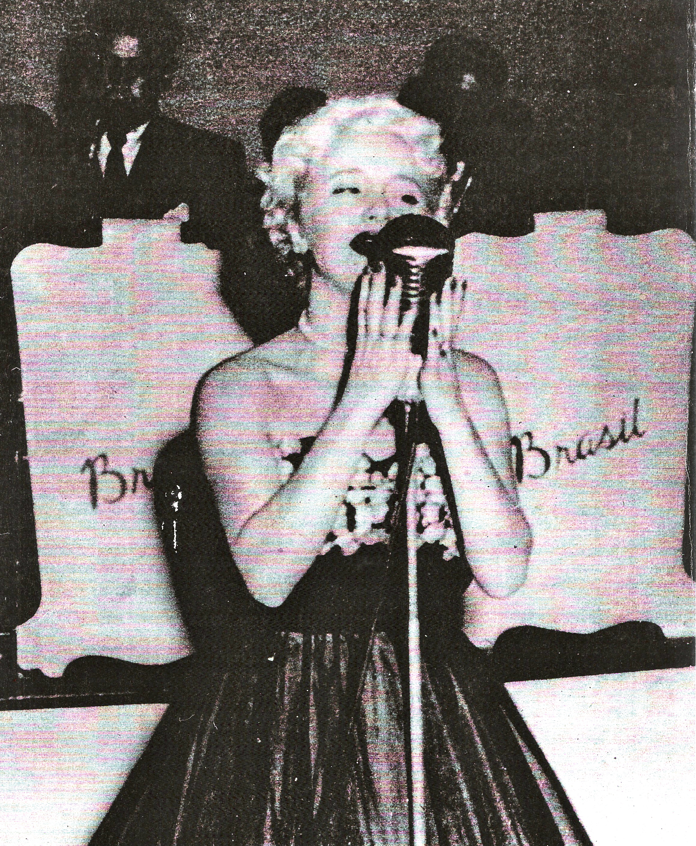 Faço parte da família da cantora e essas fotos são do arquivo da família. grato